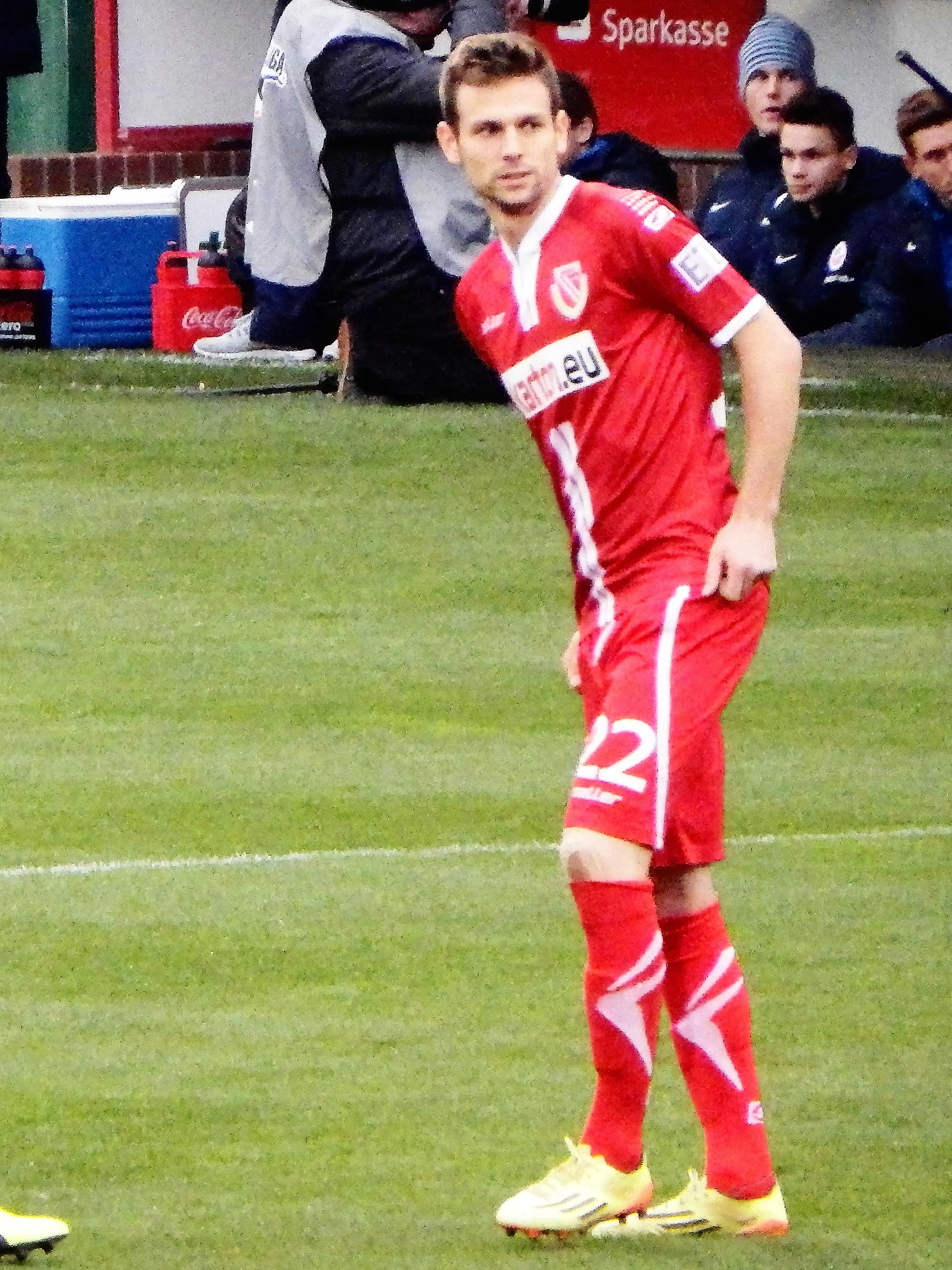 Holz, Marco Cottbus